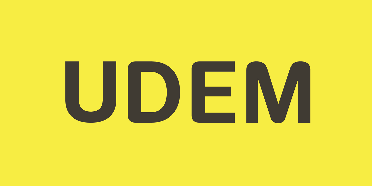 Imagen del logotipo de la Universidad de Monterrey